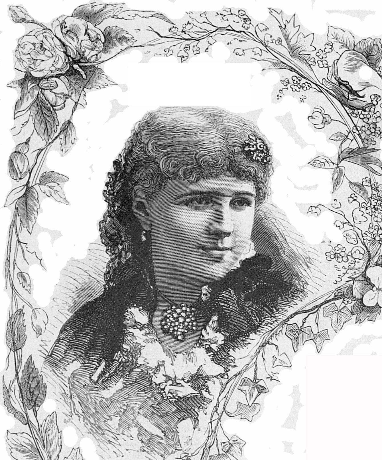 Павловская Эмилия Карловна, русская оперная и камерная певица